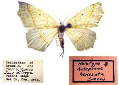 Antepione hewesata = Pionenta ochreata